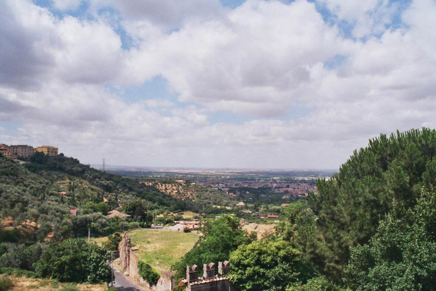 טוסקנה.